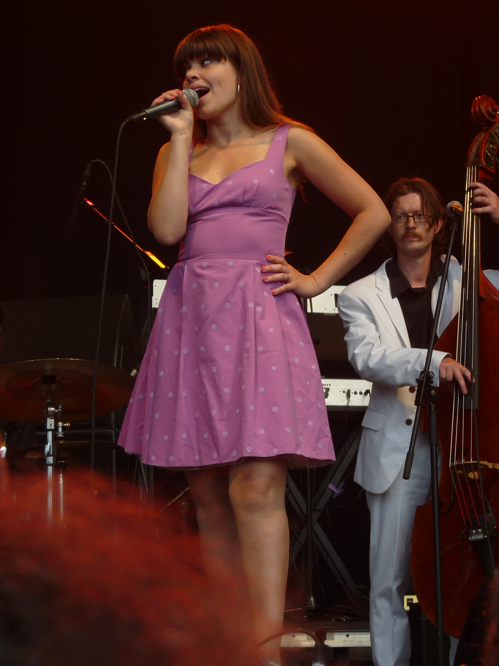 lady linn(lien de greef)